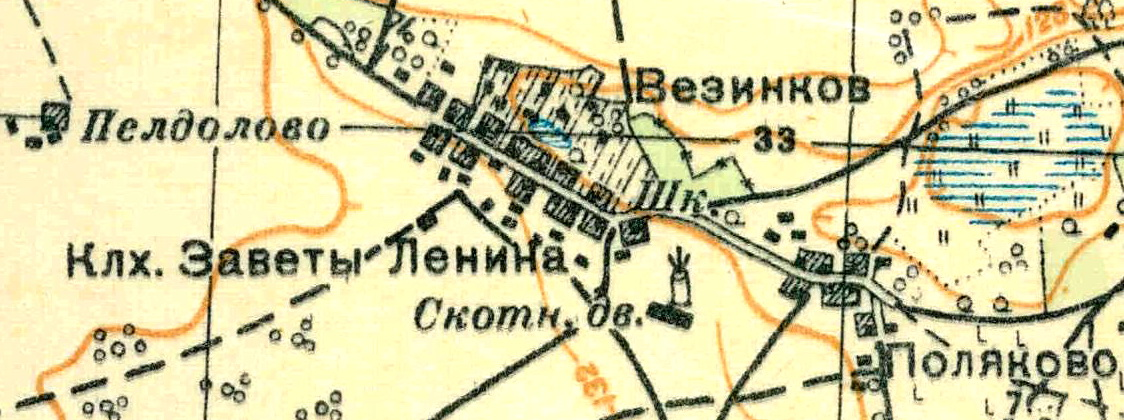 Топографическая карта Ленинградской области, квадрат О-35-24-А-в (Торосово), деревня Везиково